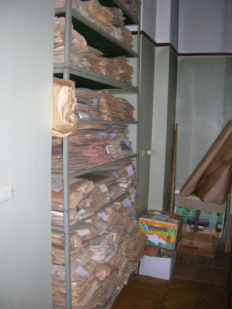 Гербарий Московского университета, завалы